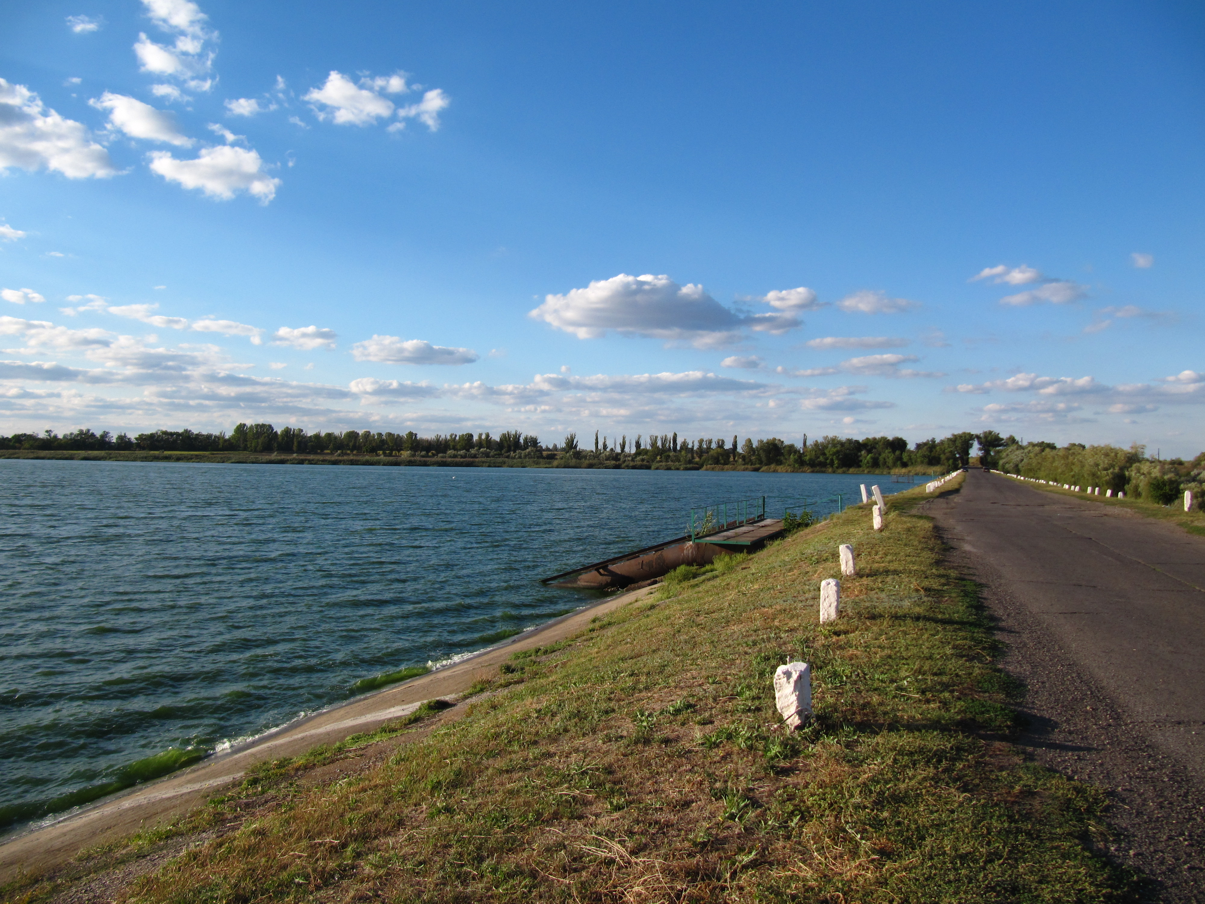 На знімку: дамба Красінського водосховища, Криворізький район, Дніпропетровська область